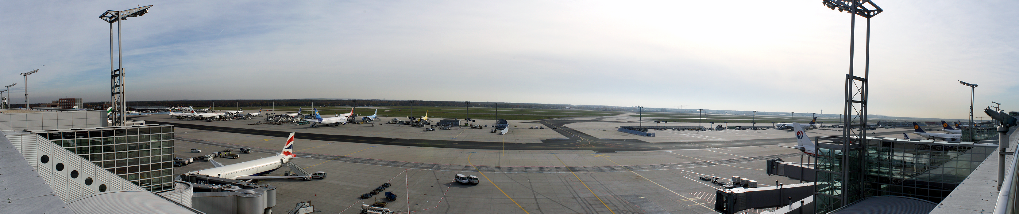 Aussicht von der Besucherterrasse des Flughafens Frankfurt am Main